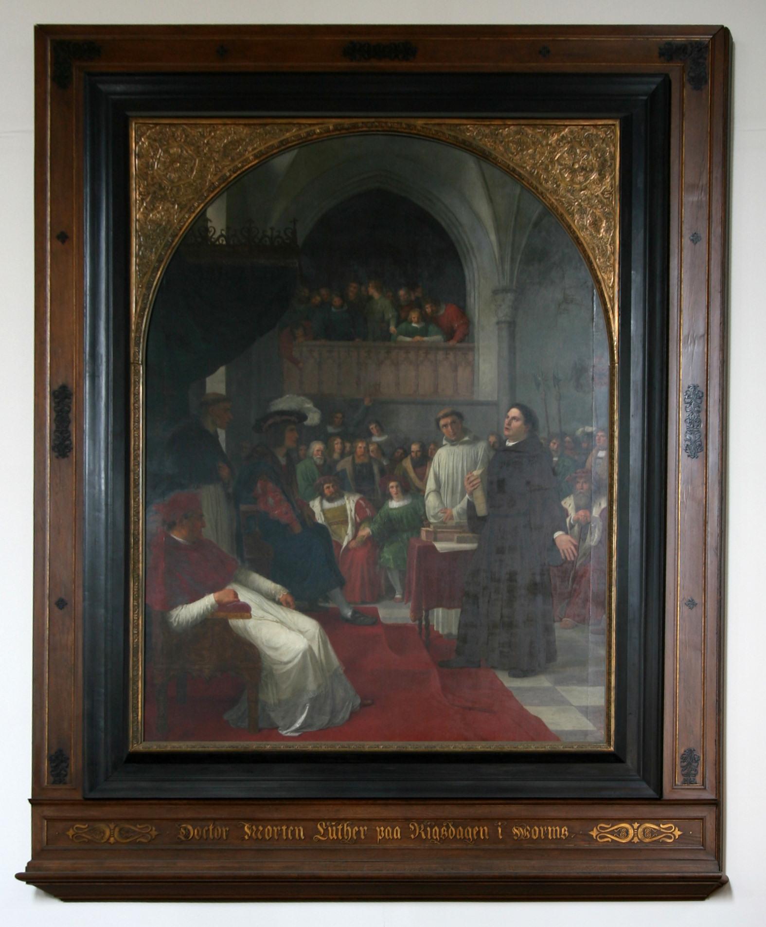 Helligåndskirken, Copenhagen, Denmark. "Luther in Worms". Painting by Adam Müller. 1837.